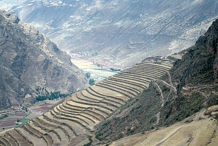 Pisac - Terrassenlandschaft Das Copyright des Bildes liegt bei mir. Das Bild habe ich selbst 2001 gemacht und das Original befindet sich in meinem Besitz. Das Bild unterliegt der GNU FDL.